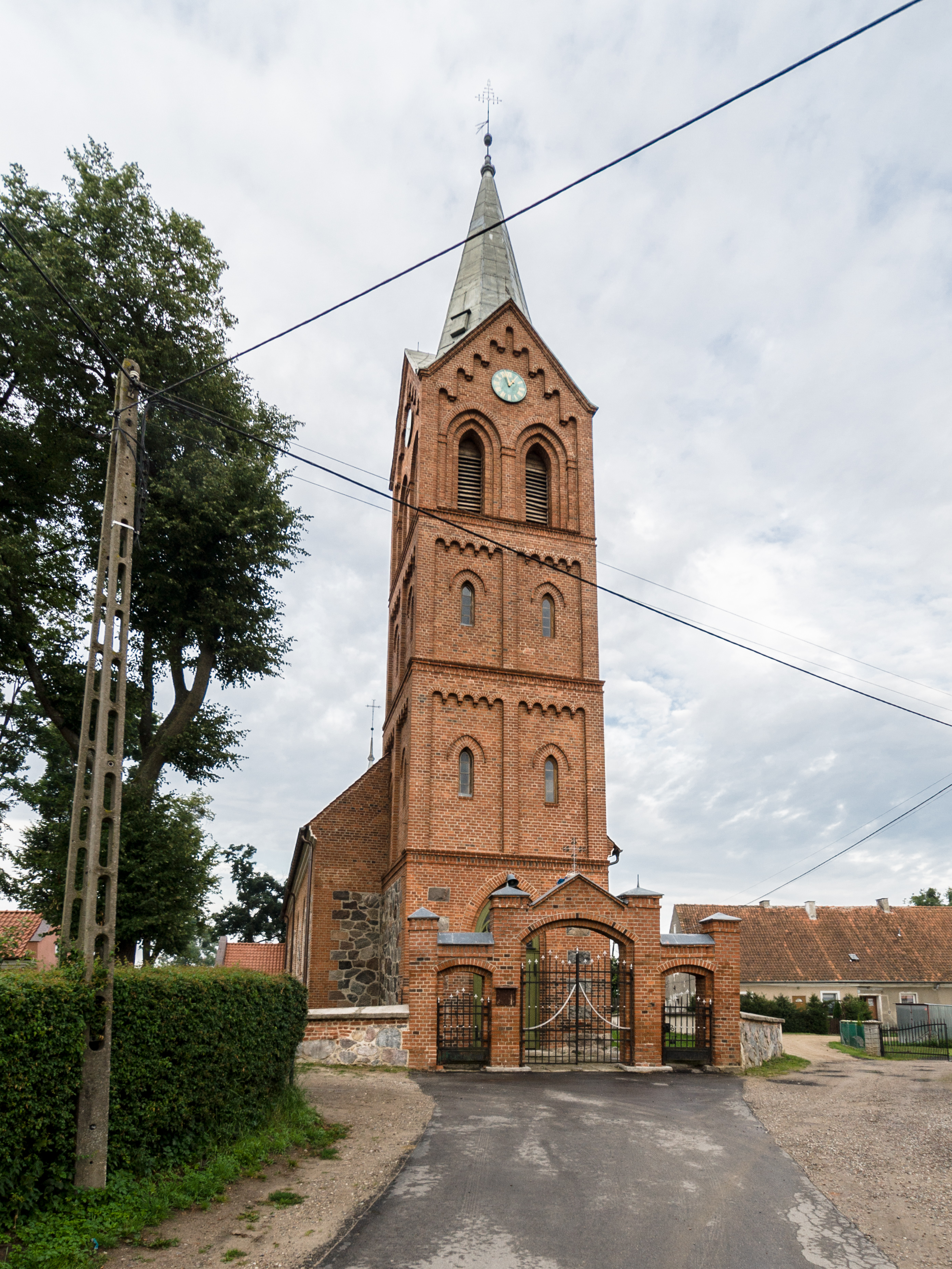 Kościół p.w. św. Elżbiety w Kraszewie.